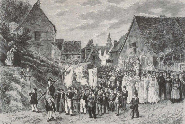 Procession de Sainte-Richarde à Andlau. Bibliothèque nationale et universitaire de Strasbourg